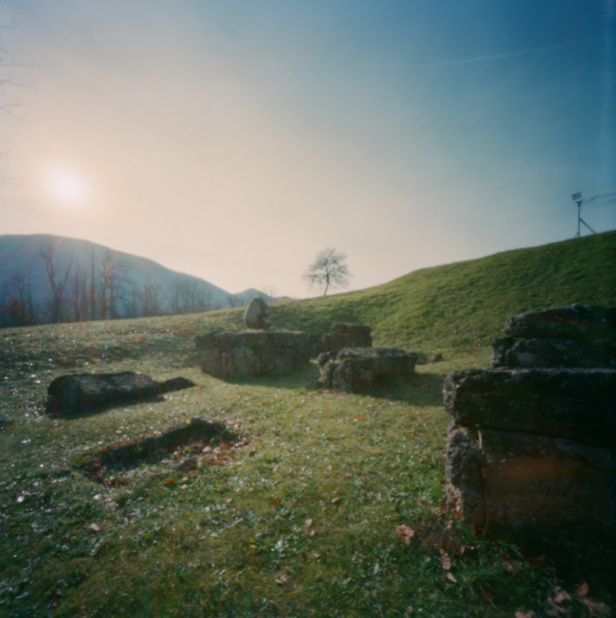 Area archeologica di Marzabotto/Kainua - MIBAC This is a photo of a monument which is part of cultural heritage of Italy.